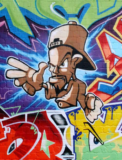 Graffiti Character von CAN2 in Münster.